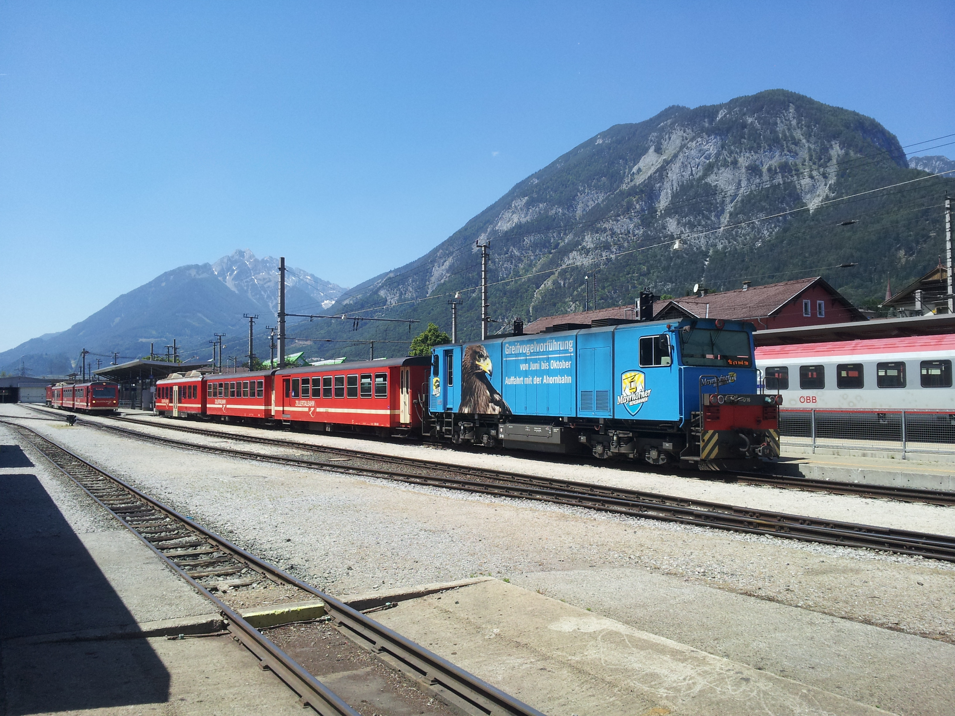 Zwei Garnituren der Zillertalbahn im Bahnhof Jenbach